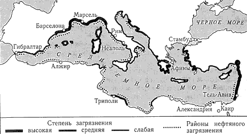 Мапа забруджвання мора.